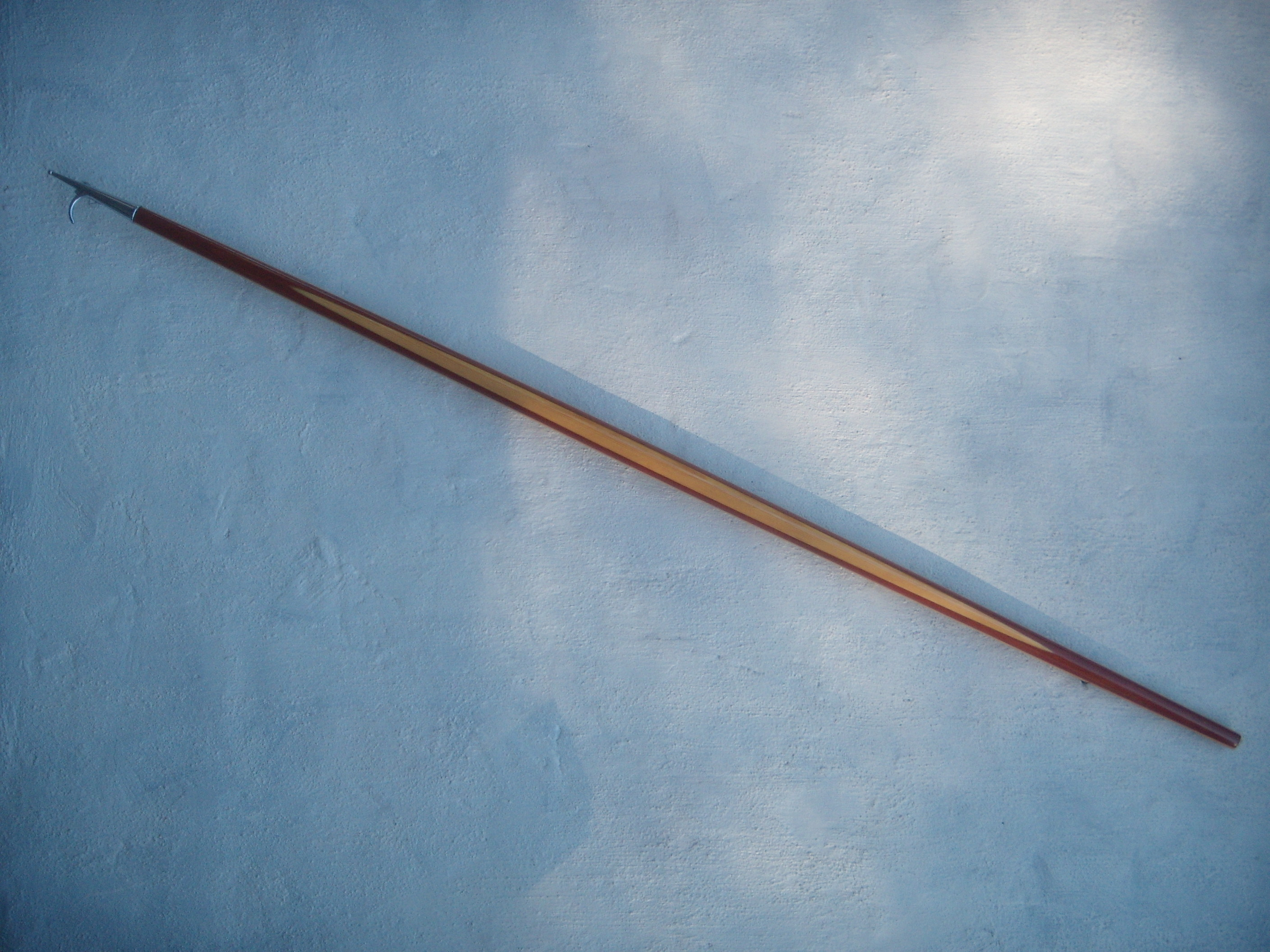 Bootshaken für Yachten.